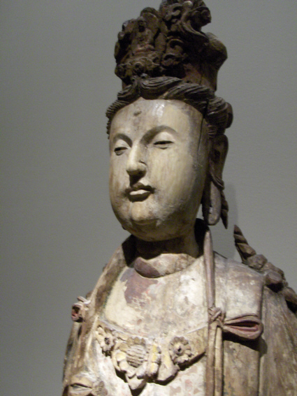 Museum für Ostasiatische Kunst Berlin